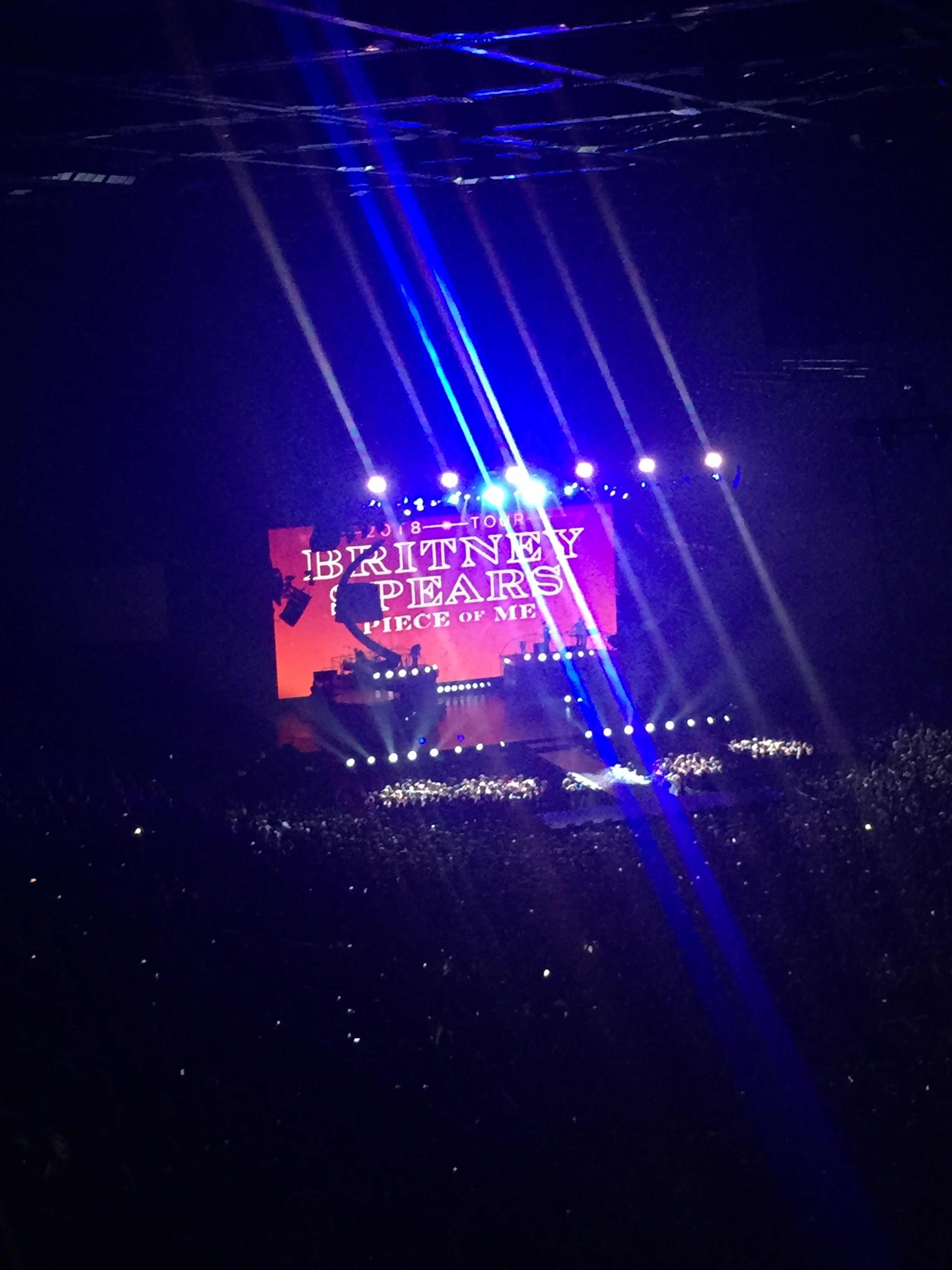 Concert Britney Spears AccorHotels Arena